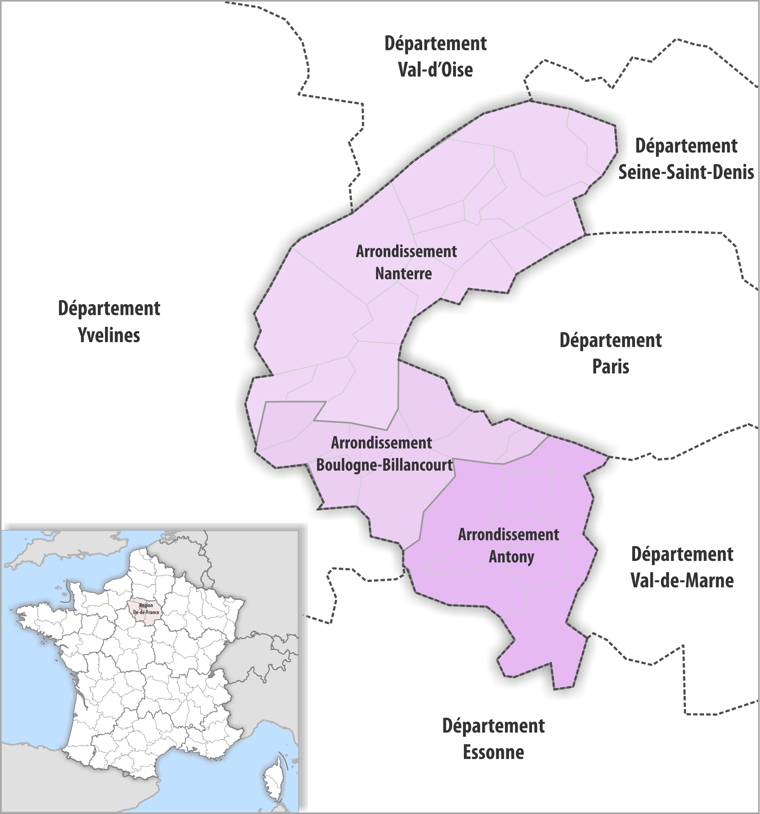 Gemeinden und Arrondissemente im Departement Hauts-de-Seine